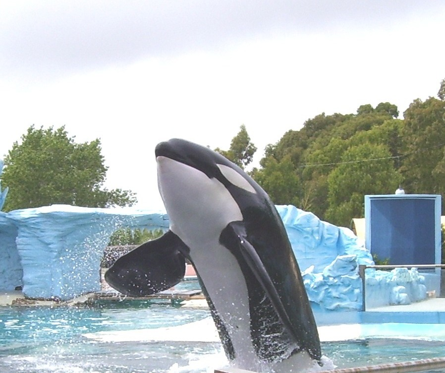 Orca en un oceanario en la Argentina.